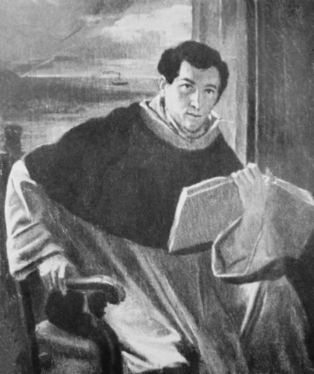 Dipinto raffigurante "Fra Vincenzo" in abito domenicano, dipinto eseguito nel 1840 dal pittore palermitano Salvatore Lo Forte.